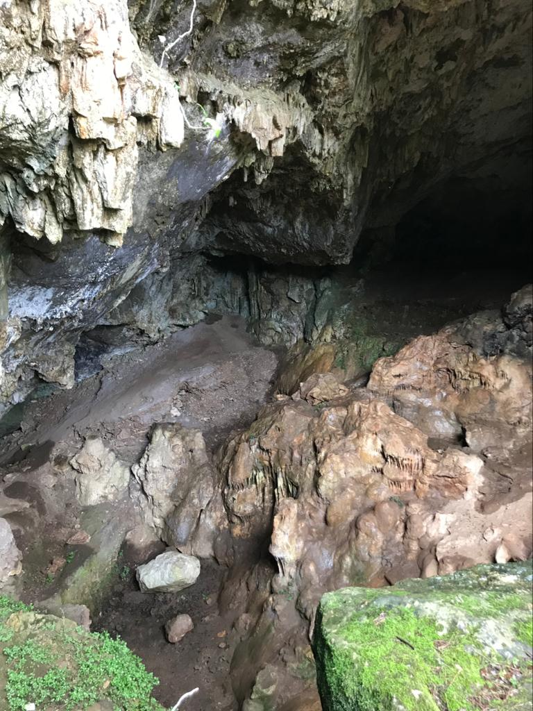 La Cova Bonica, després d'anys d'excavacions [2020].